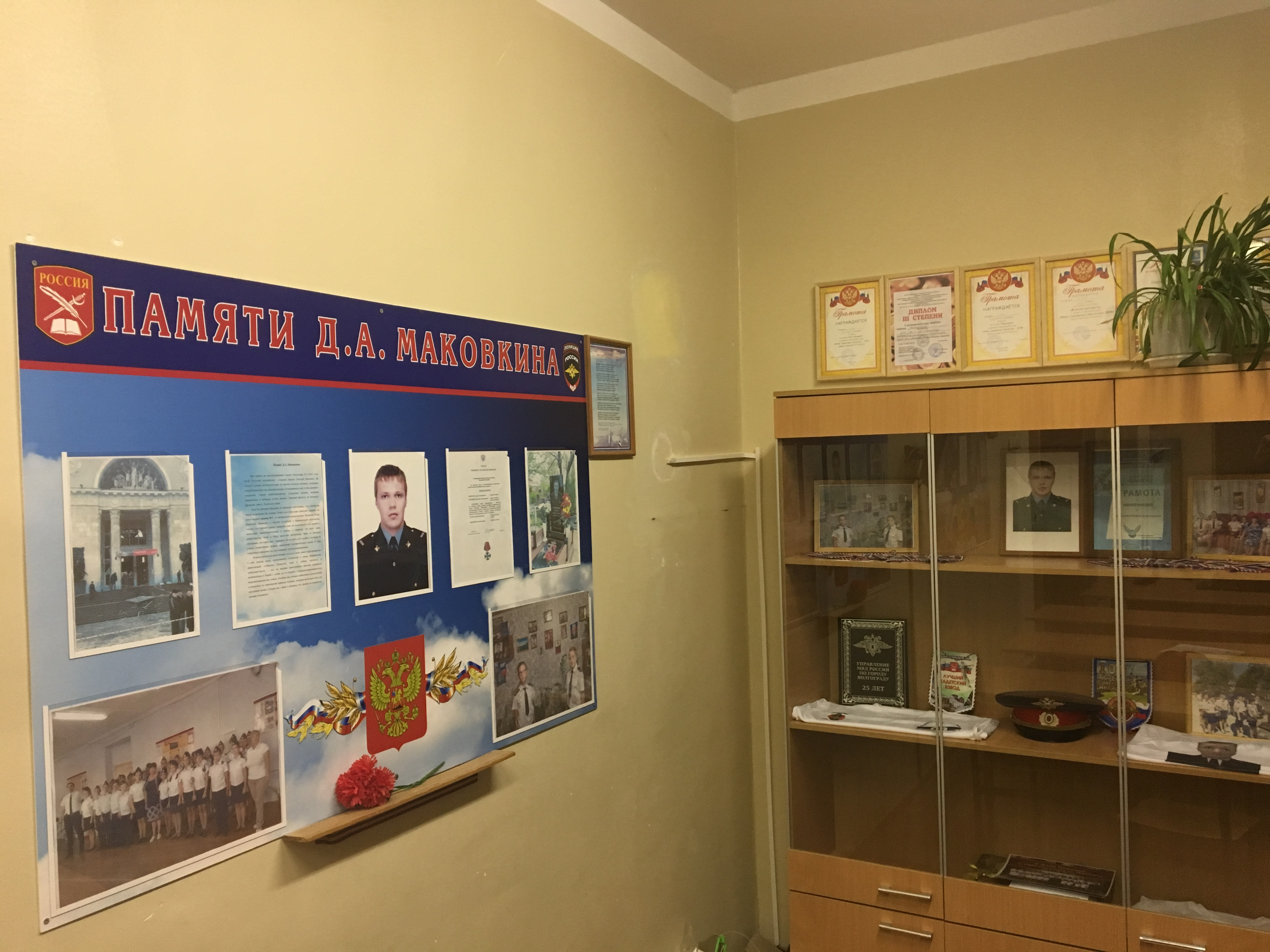 Музей Дмитрия Маковкина в кадетском взводе 7 а класса МОУ СШ №128 Волгограда